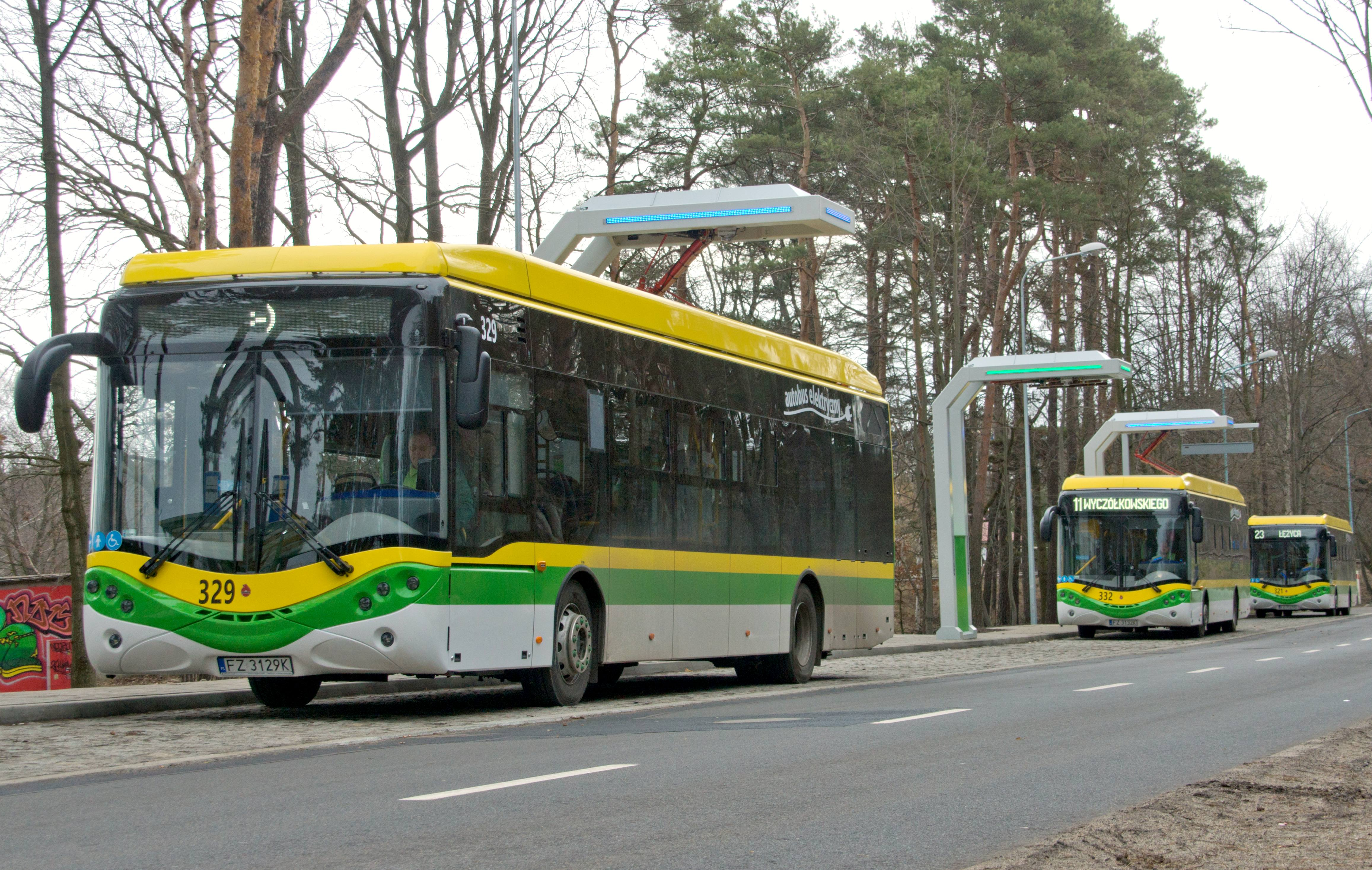 na pętli autobusowej przy ul. Wyspianskiego, ZG